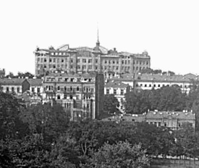 Дім Гінзбурга, перший хмарочос